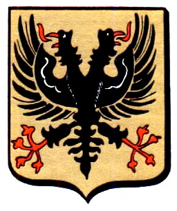 Wapenschild Ronse